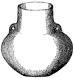 Amphore aus dem Großsteingrab Basedow 3 Sprockhoff-Nummern 398a